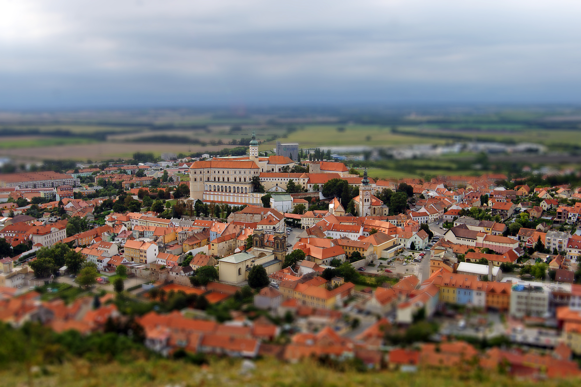 Mikulov